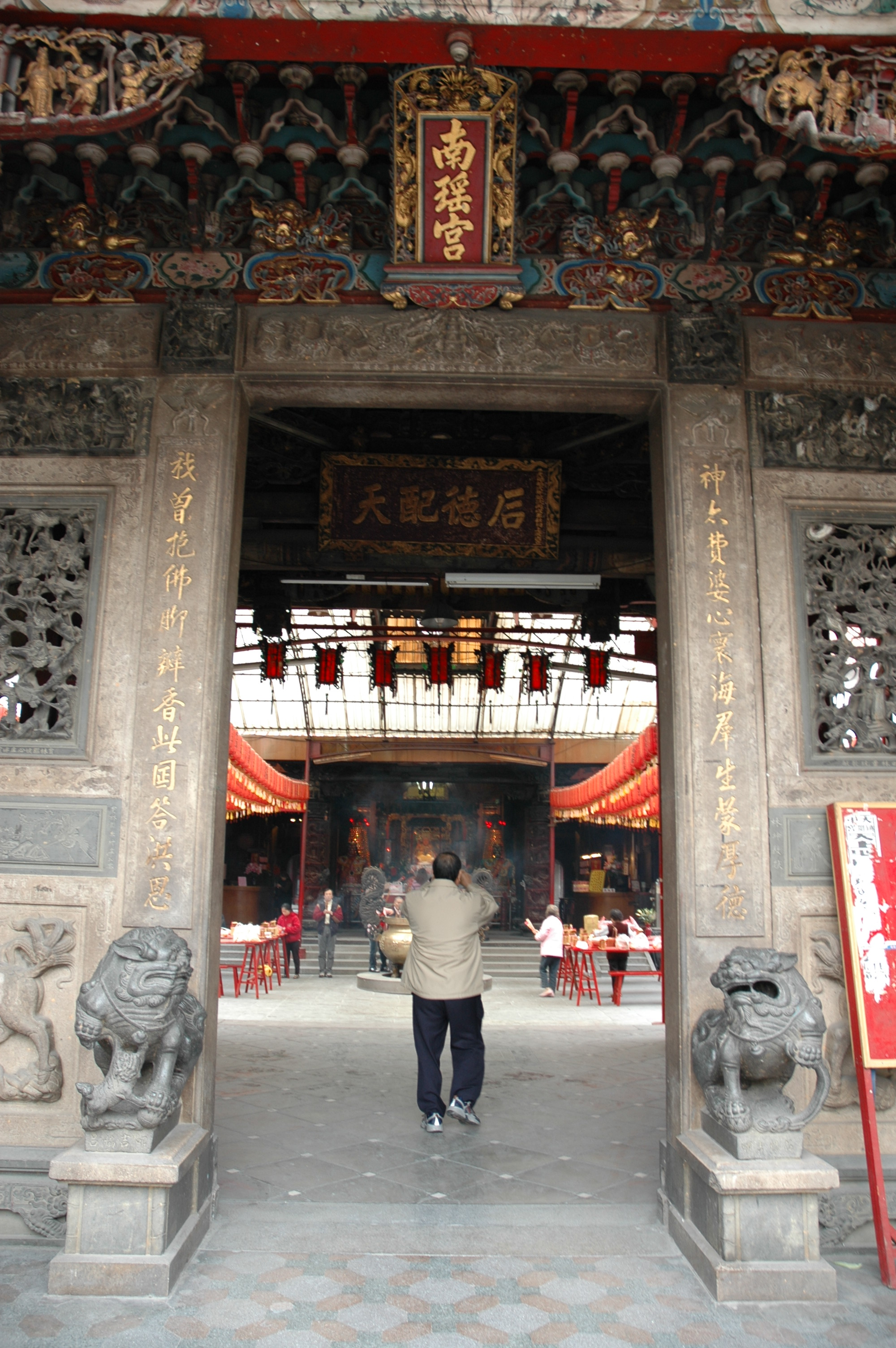 中文（台灣）: 彰化南瑤宮1